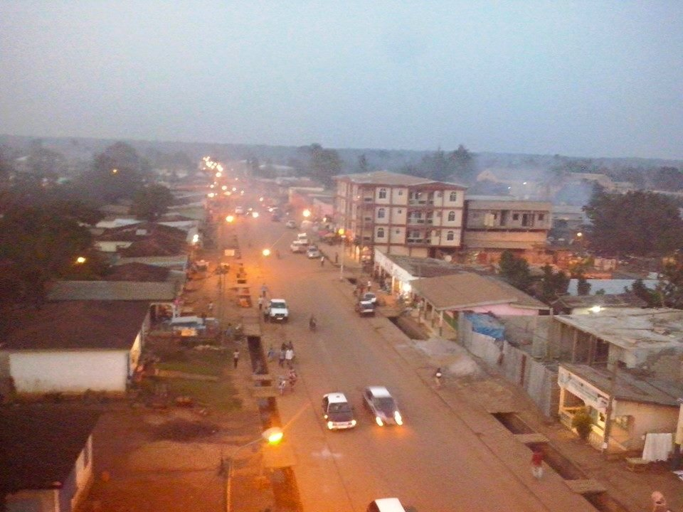 Ouesso à la tombée de la nuit